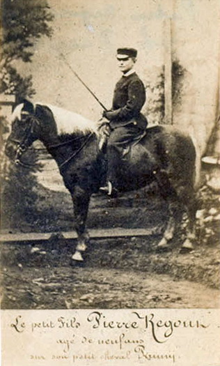 Ruiterportret van Petrus (III) Hubertus Regout op 9-jarige leeftijd. Geboren 01-09-1854; overleden 30-09-1928. Gehuwd in 1876 te Venlo met Louisa Petronella Roberta Wilhelmina Berger (1853-1932). Directeur NV Kristal-, Glas- en Aardewerkfabrieken De Sphinx v/h Petrus Regout & Co. (1899-1923). Voorzitter Bond der Belgisch-Hollandsche Glasfabrieken. Voorzitter raad van beheer Koninklijke Nederlandsche Papierfabriek. De foto bevindt zich in het Album de la famille de Mr. Pierre Regout à Maestricht, vervaardigd omstreeks 1869 door Billon, rue des Recollets, 13, Parijs ("Photographe, Neveu et Élève de Mr. Daguerre"). Het bevat foto’s van diverse leden van de familie Regout en van de prenten uit het Album dédie à mes enfants et mes amis. Fotocollectie RHCL Maastricht, GAM 19633.